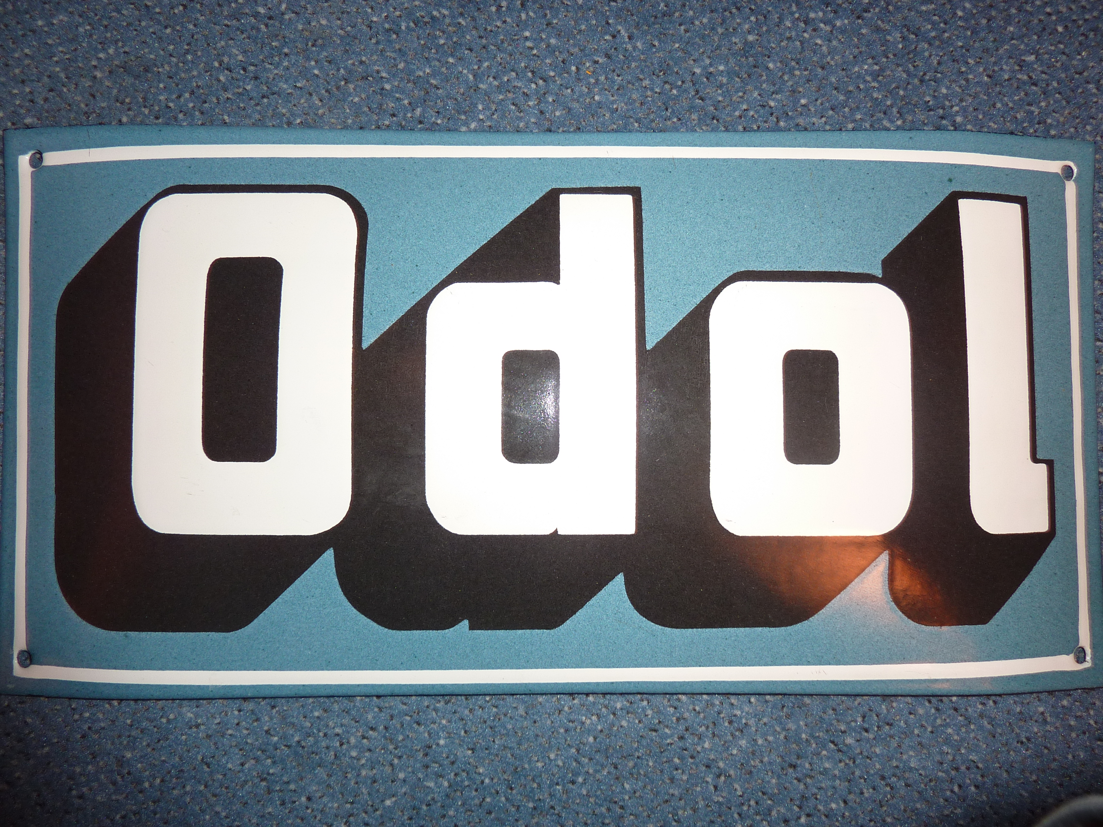 Replikat eines alten Emaille-Schilds von Odol